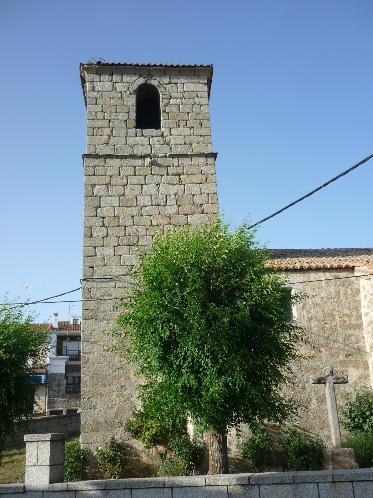 Fotos de Alejandro Blanco © Álbum 2945 By Catedrales e Iglesias Diócesis de Avila En la Iglesia parroquial, bajo la advocación de S. Juan bautista, existe la Capilla de la Virgen de las Angustias, que constituye otro monumento excepcional de piedad mariana.